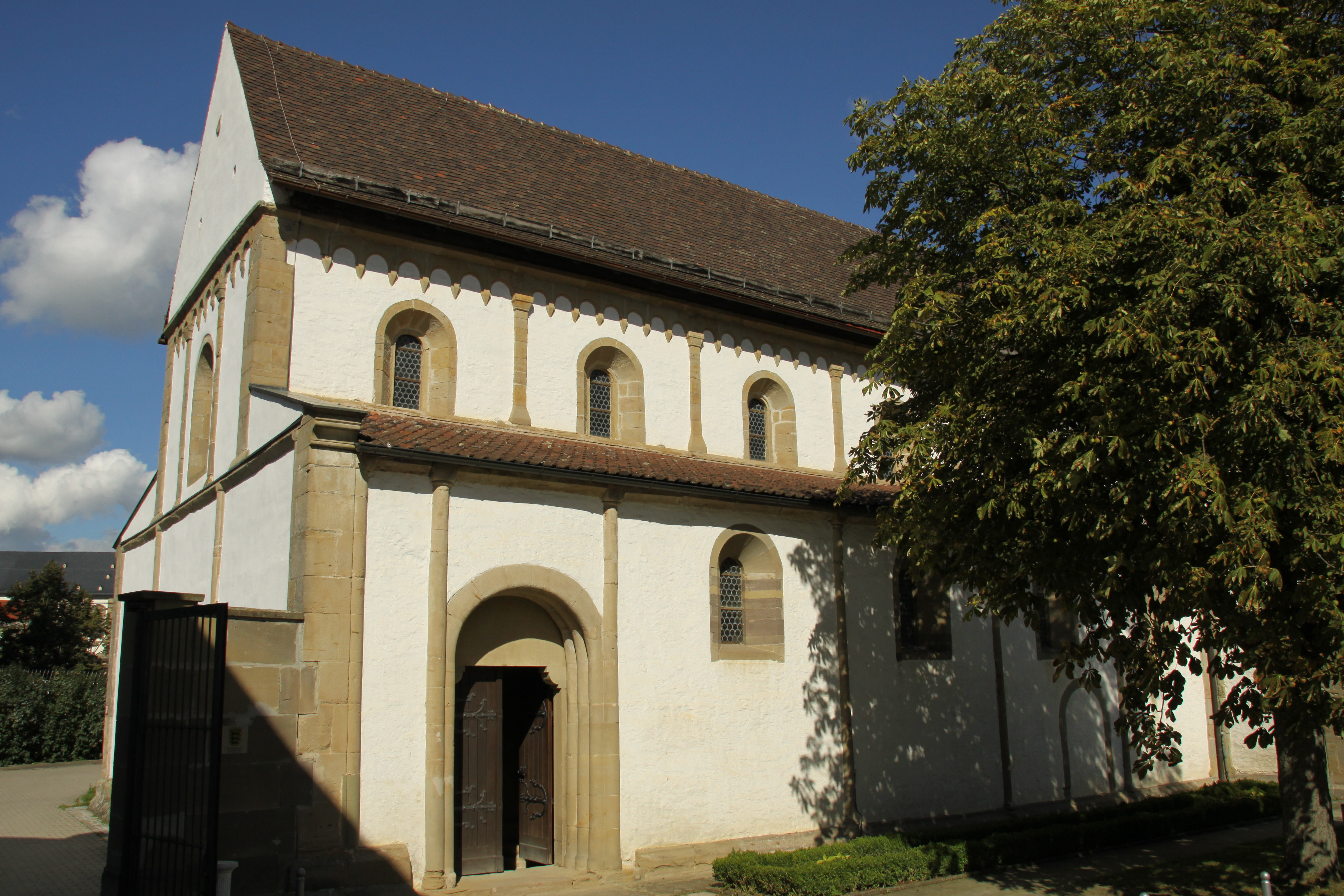 Kleine Comburg- Romanische Kirche